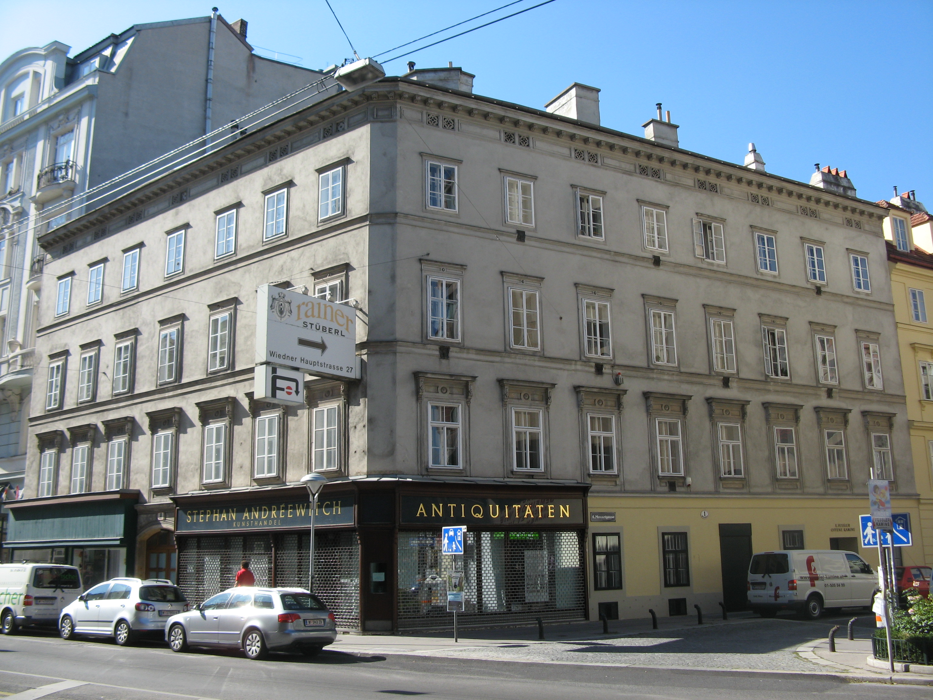 Haus (1798, 1859-61 erweitert), Favoritenstraße 10, Wien-Wieden